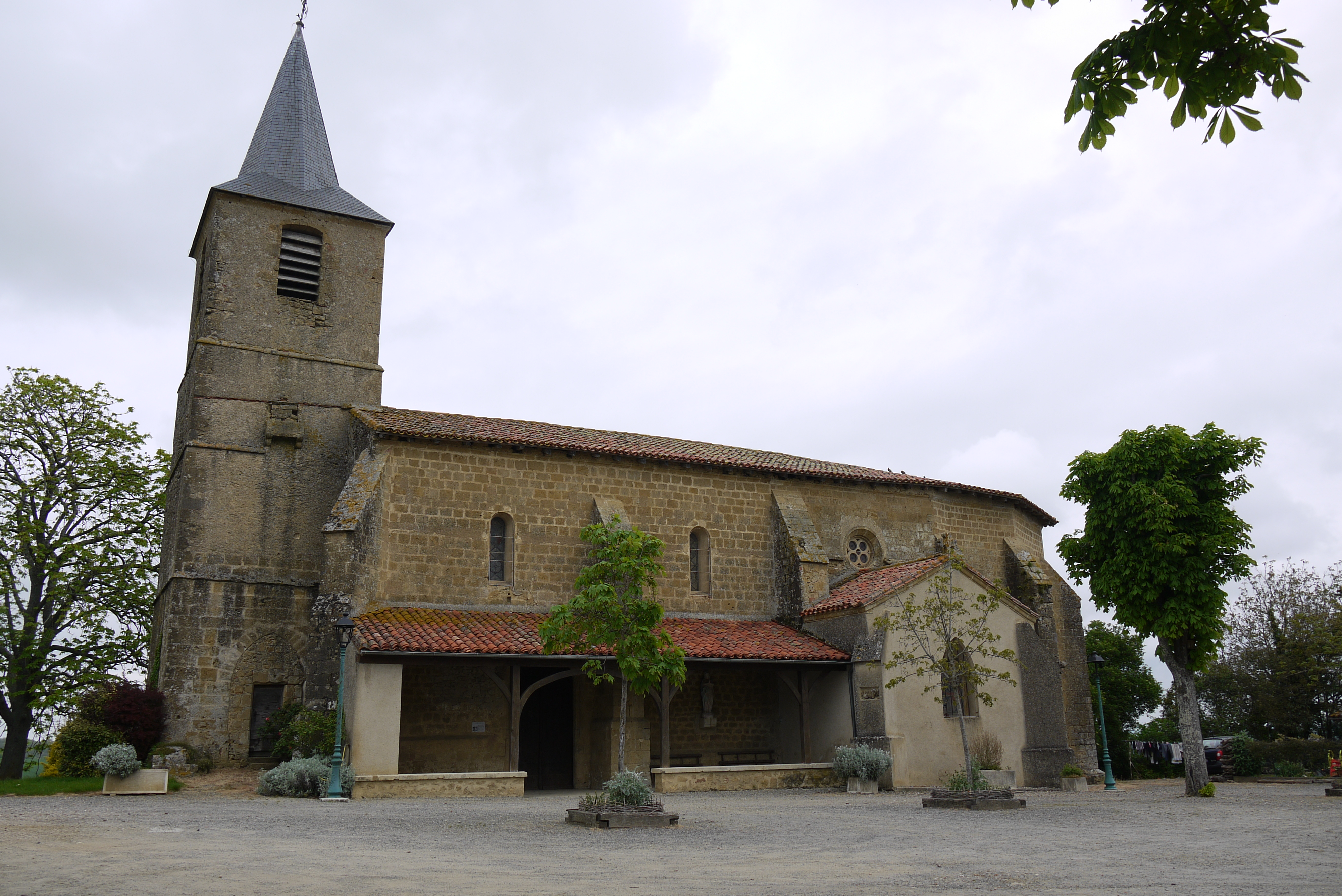 Façade sud de l'église Saint-Abdon-et-Saint-Sennen de Labéjan